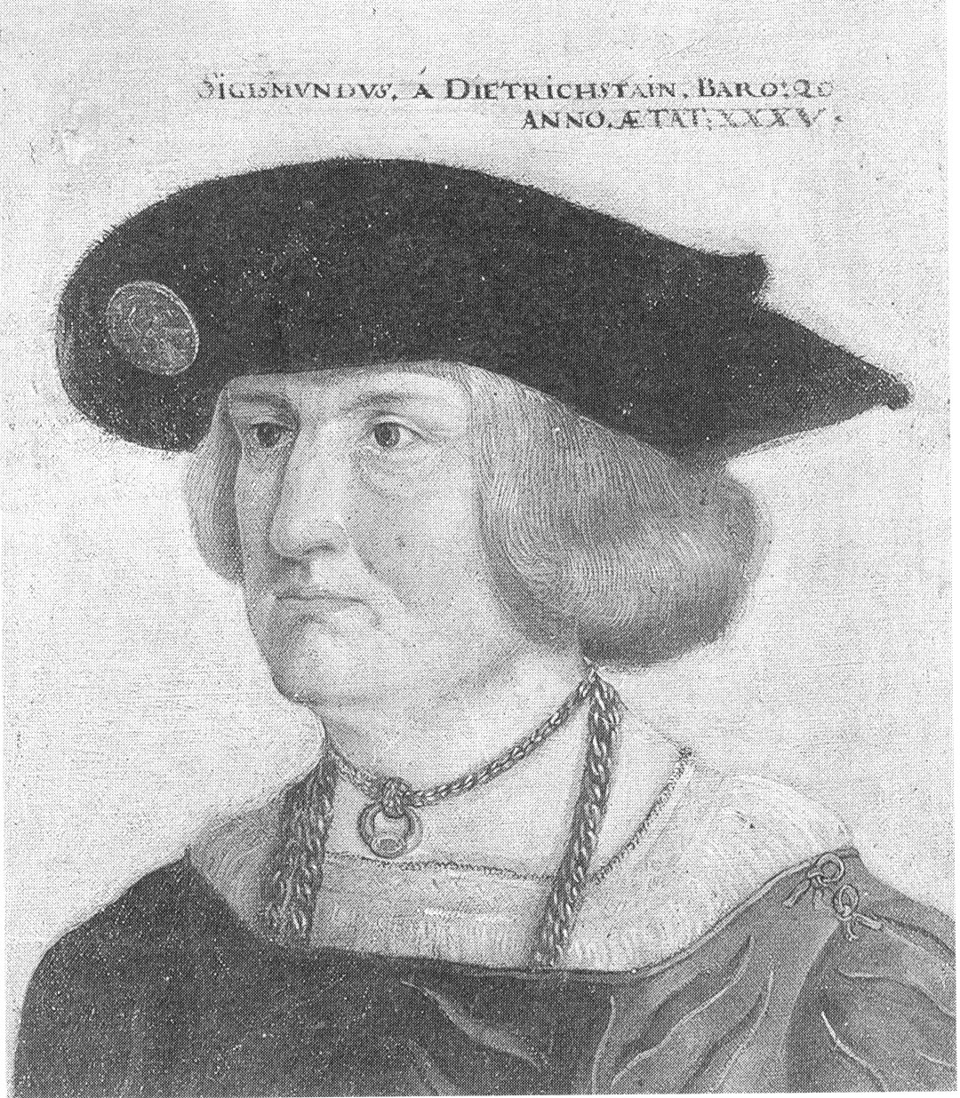 Sigmund von Dietrichstein Silberkämmerer und Rat Maximilians I. Landeshauptmann des Herzogtums Steier